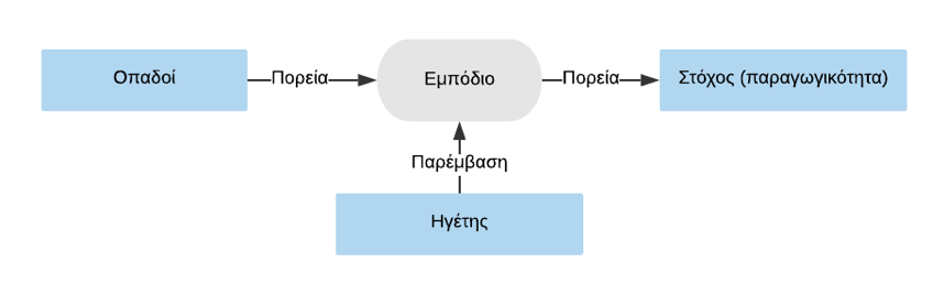 Θεωρία πορείας-στόχου (Αναπροσαρμογή από Northouse, 2018: 116)